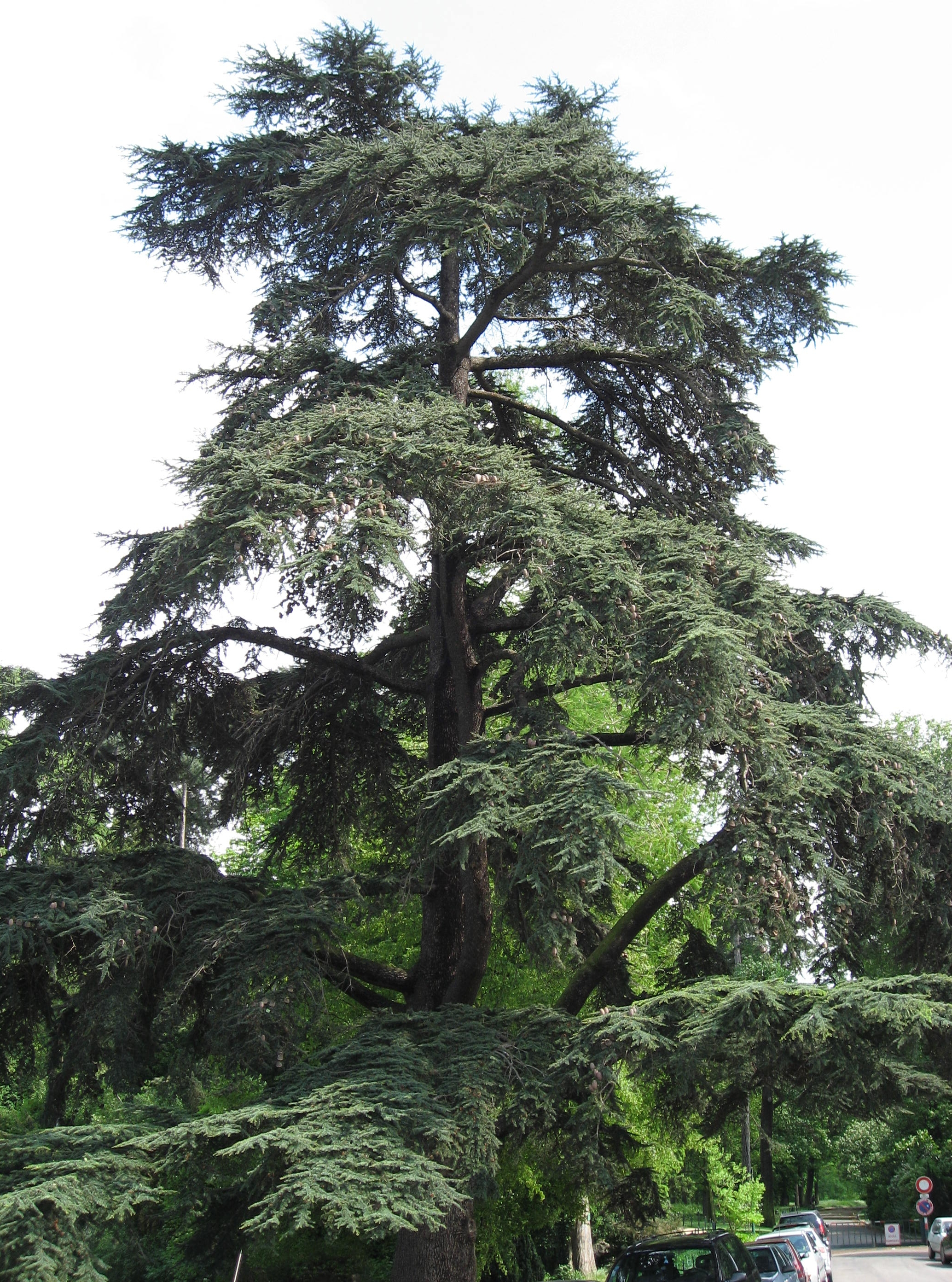 Cedrus libani in Bois de Boulogne Map: 48° 51' 48" N 2° 14' 26" E